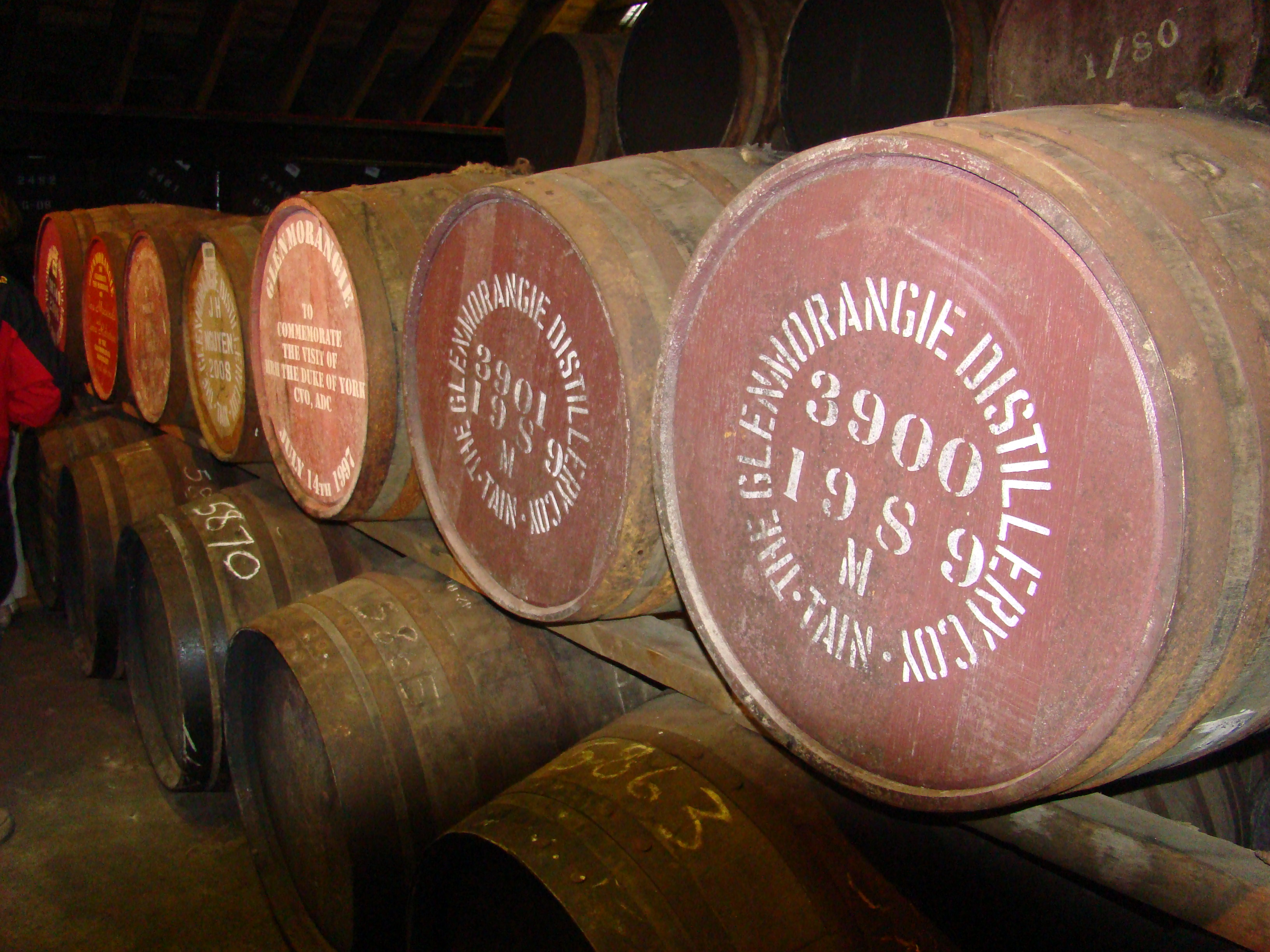 Eichenfass-Lager der Glenmorangie Destillery